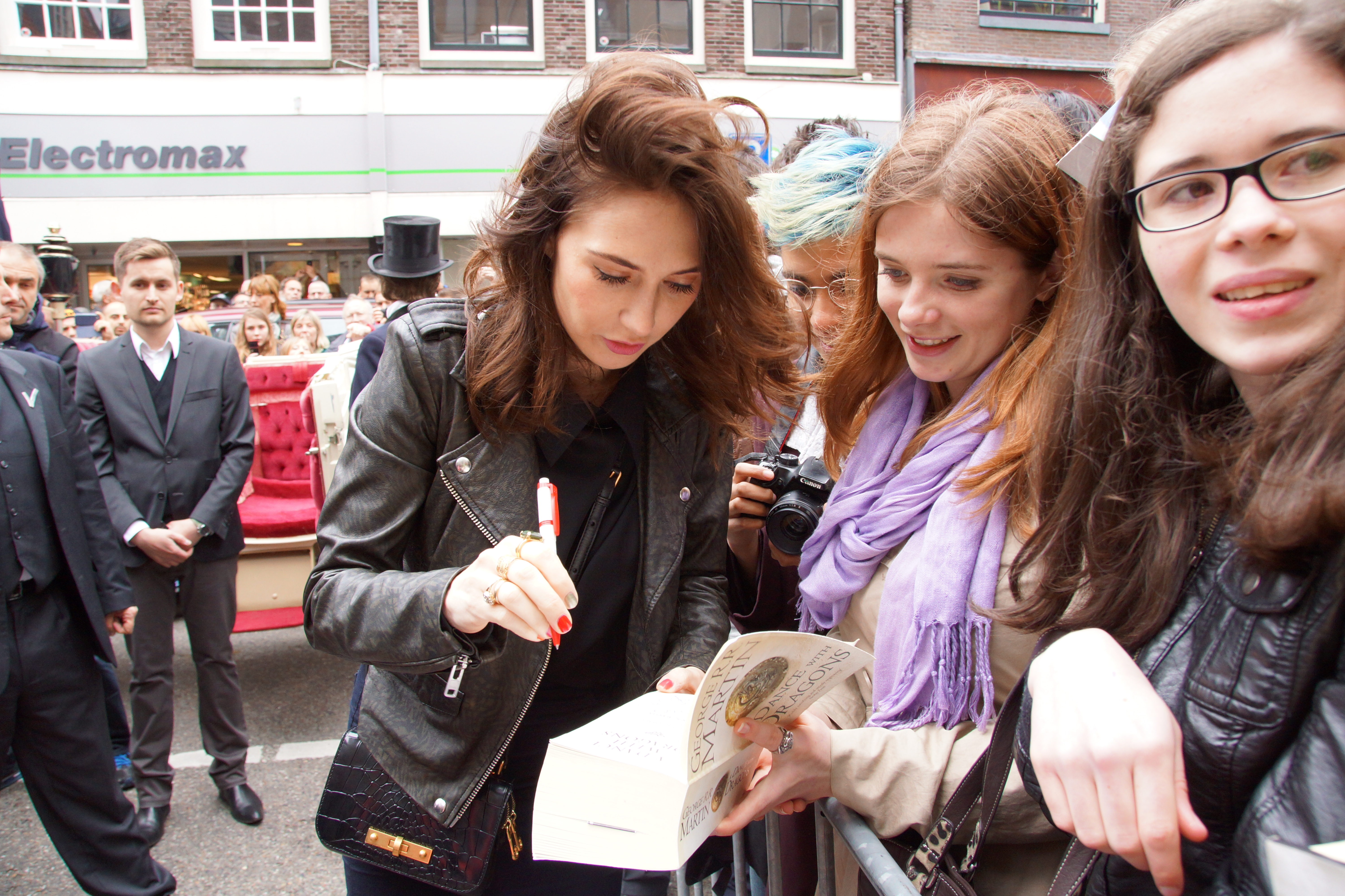 Carice van Houten, 2013-1